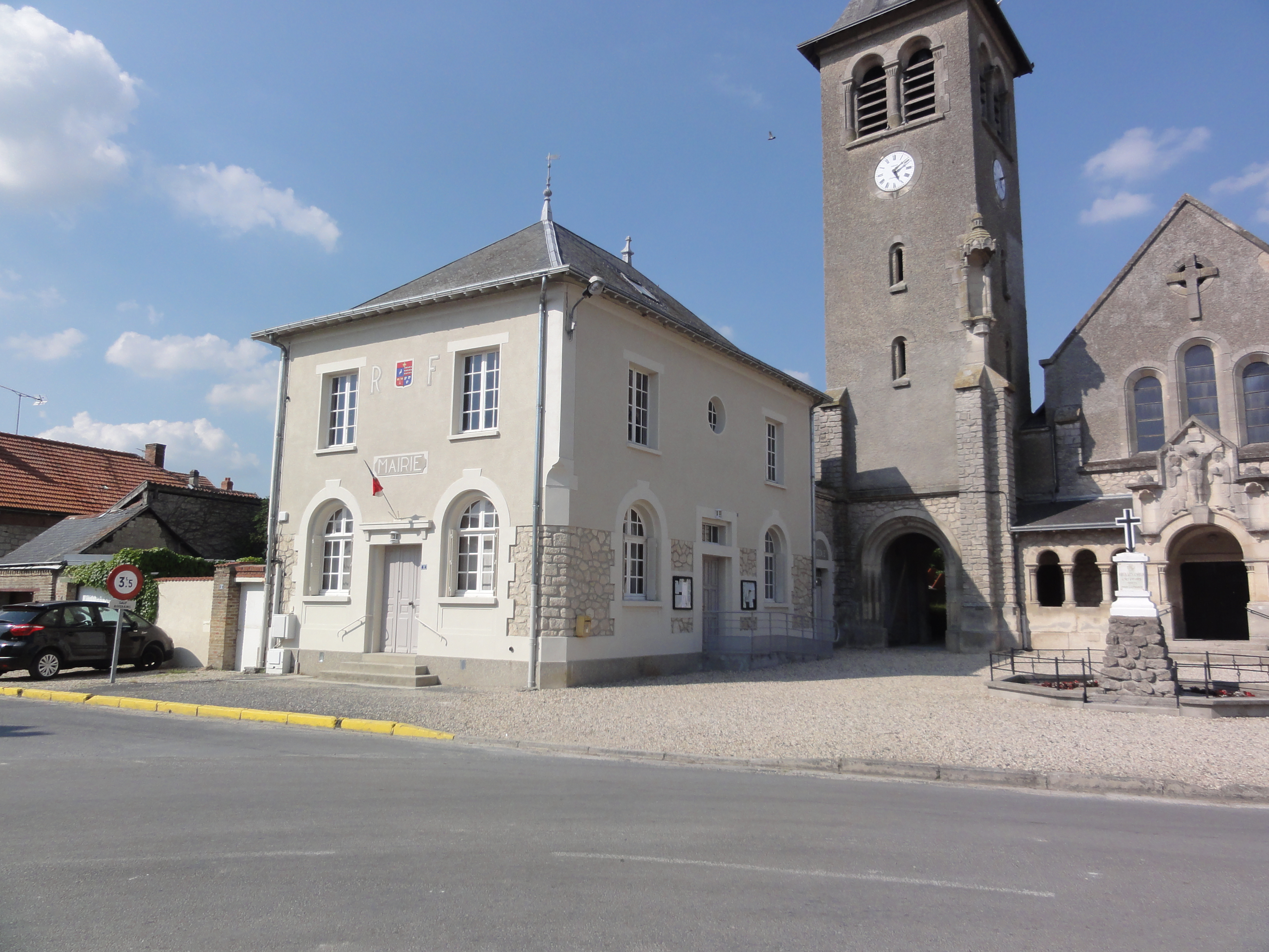 Vieux-lès-Asfeld (Ardennes) Mairie